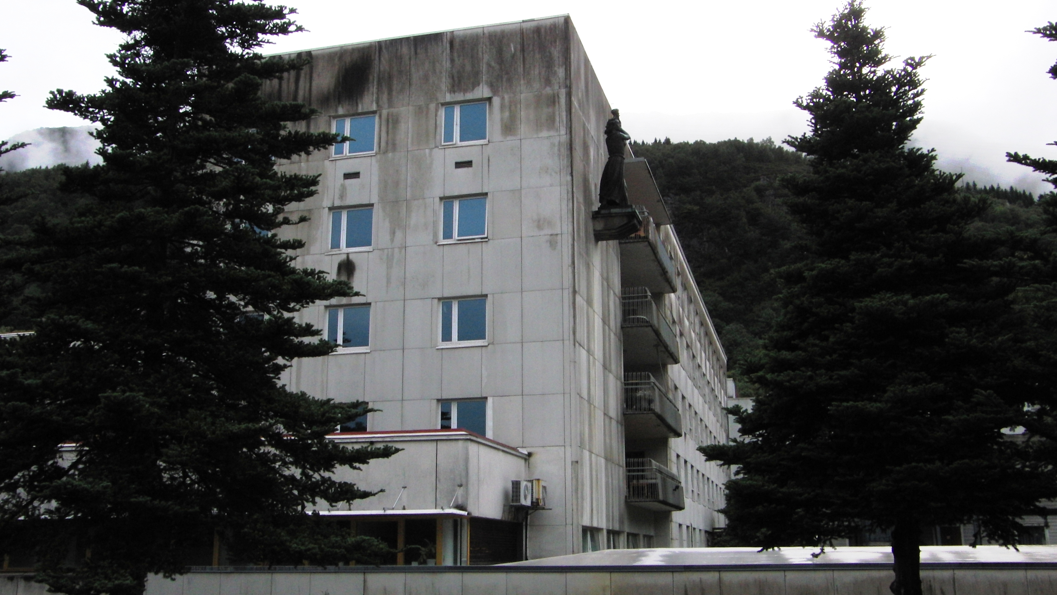 Description=Barneklinikken (Haukeland Universitetssykehus)